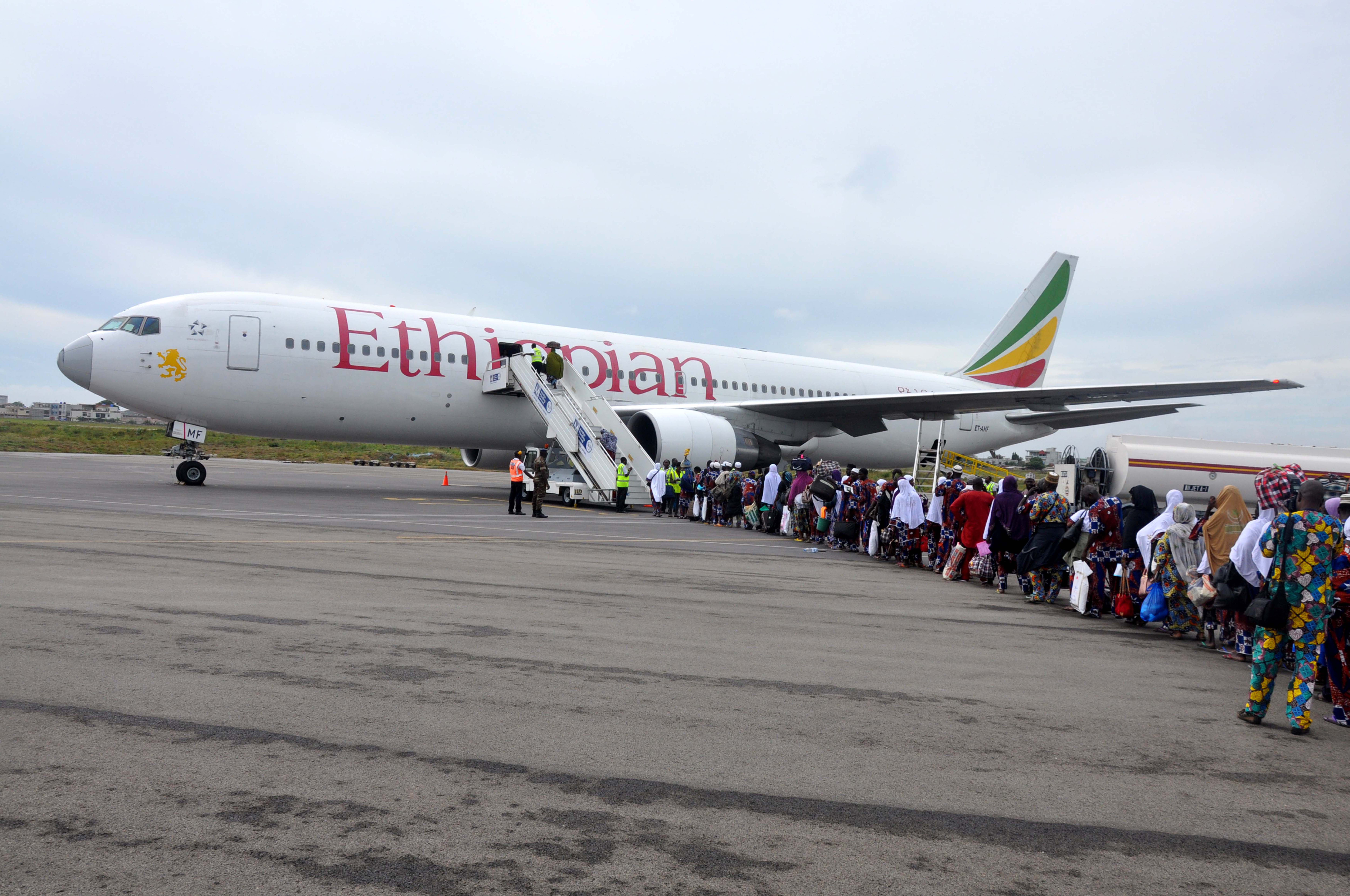 Muslims take flight for thirty days of intense Mecca prayer This is an image with the theme "Africa on the Move or Transport" from: Benin